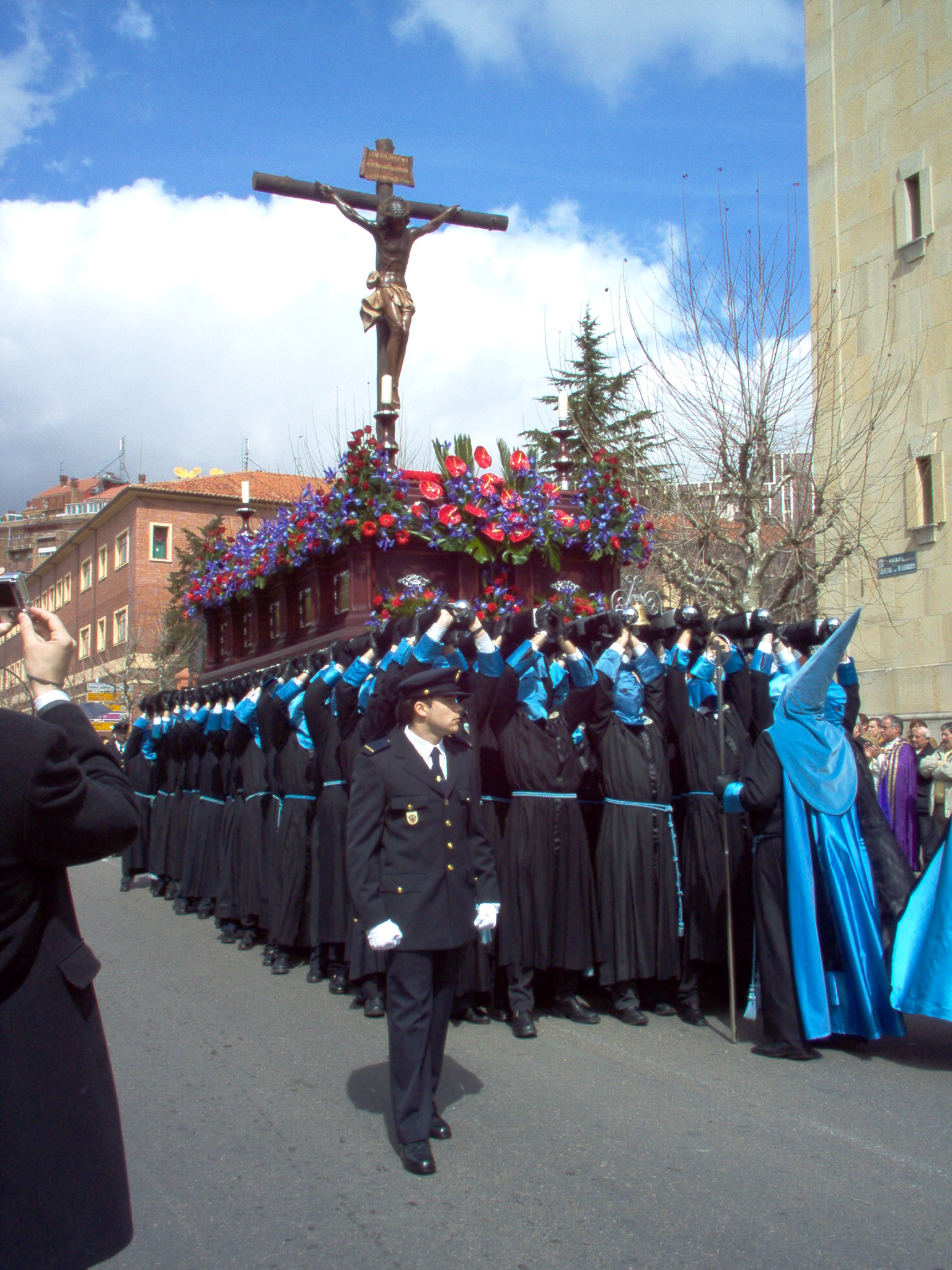 El Santo Cristo de la Bienaventuranza (León, España) es subido "al cielo" ante la iglesia parroquial de San Claudio durante la procesión de las Bienaventuranzas (Jueves Santo, 2005)